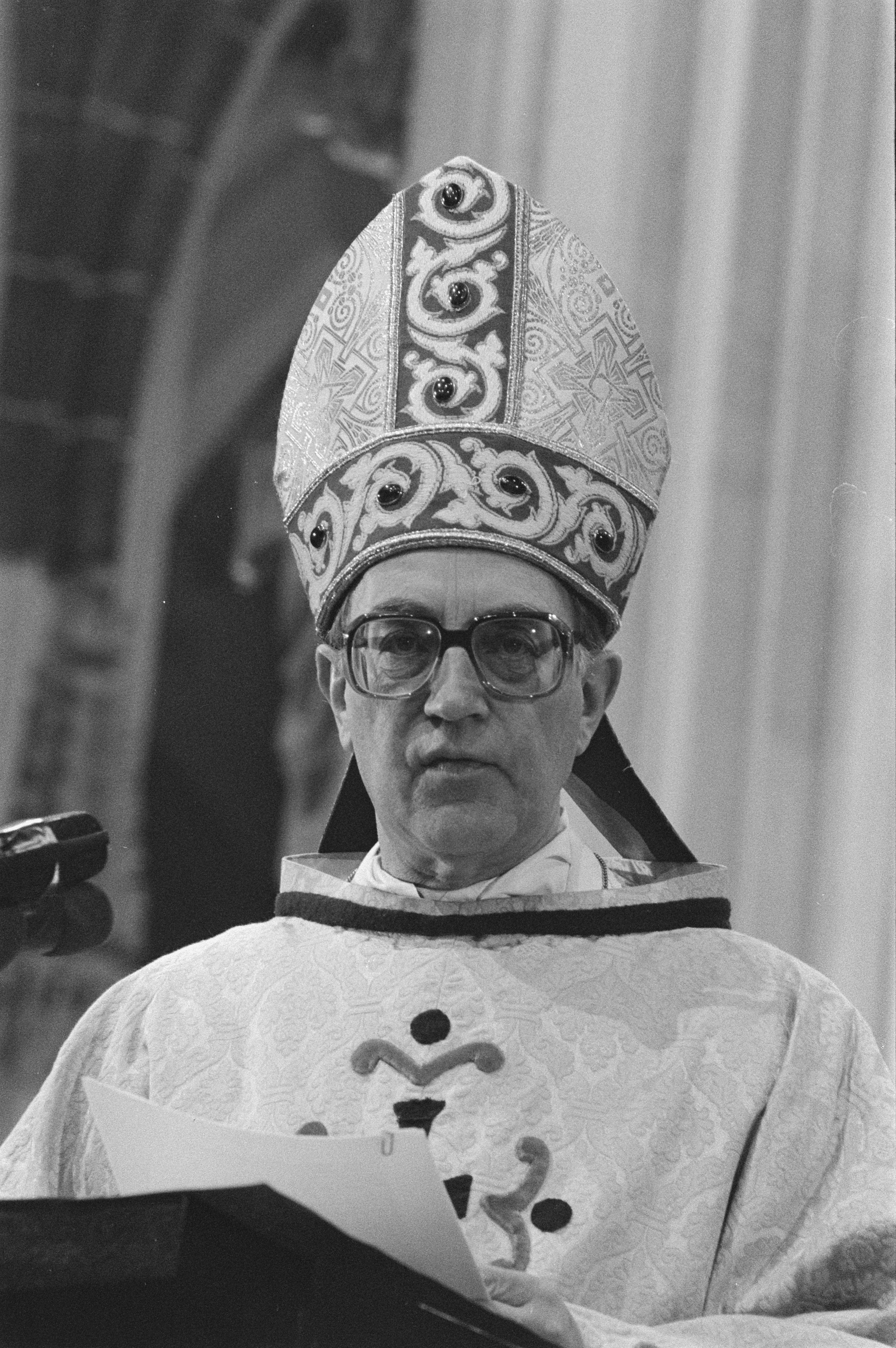 Collectie / Archief : Fotocollectie Anefo Reportage / Serie : [ onbekend ] Beschrijving : Installatie Bisschop Ter Schure in de St. Jans Kerk in Den Bosch ; Bisschop Ter Schure (kop) Datum : 9 maart 1985 Locatie : Den Bosch Trefwoorden : bisschoppen, installaties Persoonsnaam : Bisschop Ter Schure Instellingsnaam : Sint-Janskerk Fotograaf : Bogaerts, Rob / Anefo Auteursrechthebbende : Nationaal Archief Materiaalsoort : Negatief (zwart/wit) Nummer archiefinventaris : bekijk toegang 2.24.01.05 Bestanddeelnummer : 933-2603